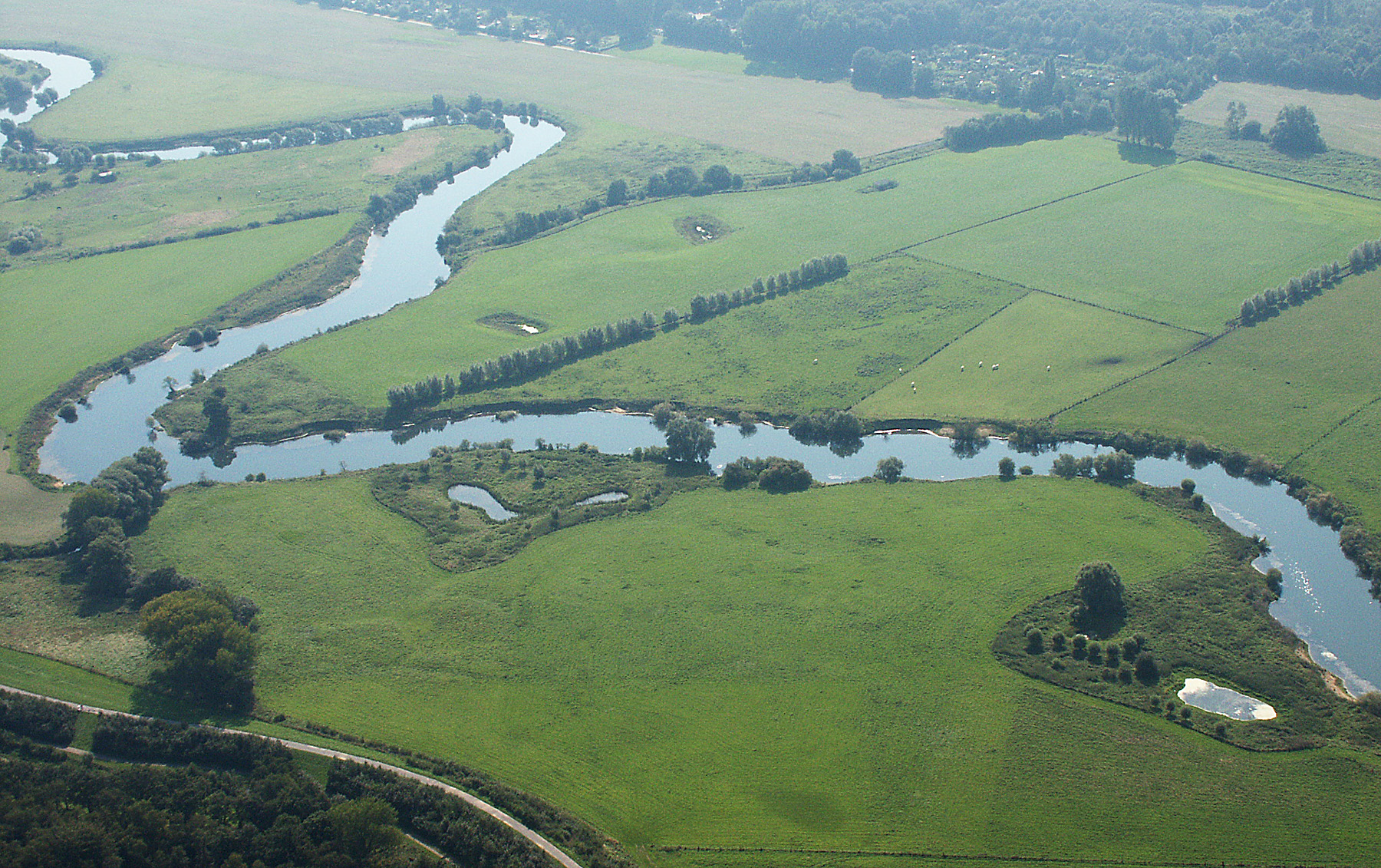 Luftaufnahme der mäandrierenden Lippe (Fluss) westlich vom Stadtkern Lünen, Nordrhein-Westfalen – Blick von Lünen-Alstedde nach Südosten übers Naturschutzgebiet „Lippeaue von Lünen bis Schleuse Horst“ (NSG UN-053); etwa mittig im oberen Bildteil ist der Unterlauf der Rühenbecke bis zur Mündung in die Lippe zu erkennen (im NSG und teilweise dessen Rand bildend); oben links im Bild der Segelflugplatz Lünen-Lippeweiden (außerhalb des NSG); unten links der Weg auf dem Lippe-Deich bei Alstedde.